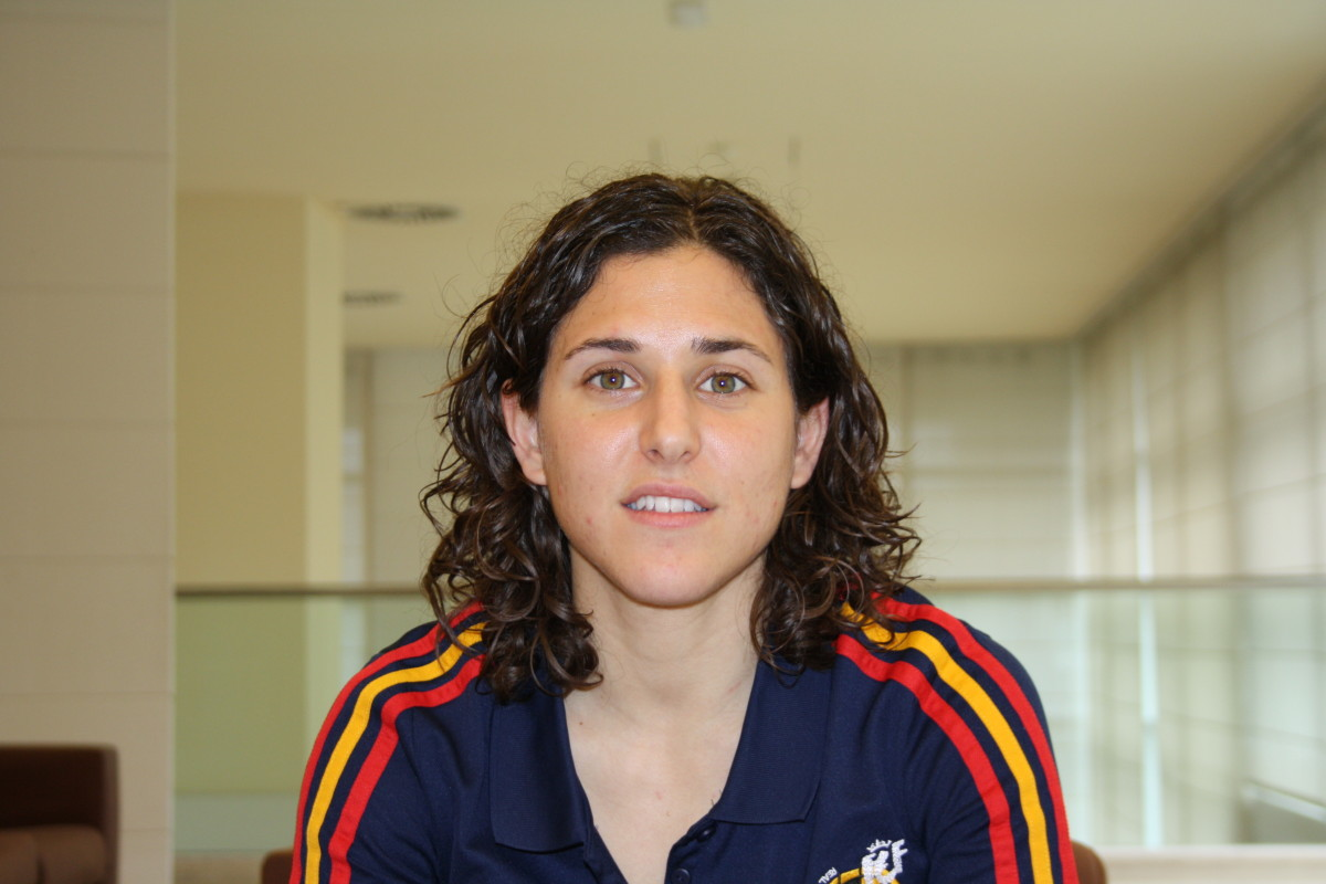 Verónica Boquete nunha entrevista no 2012.